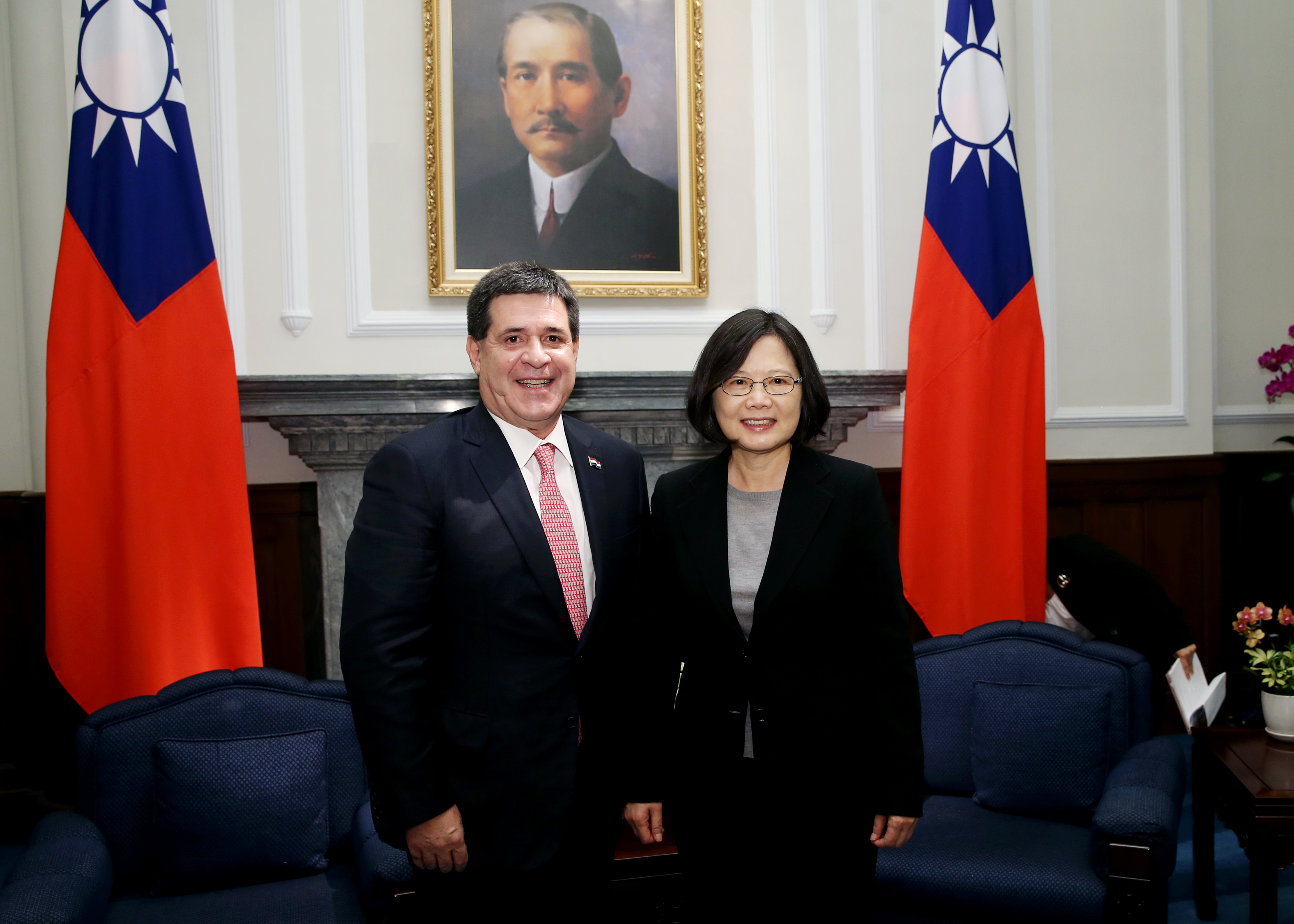 President Tsai meets Paraguay President Horacio Cartes